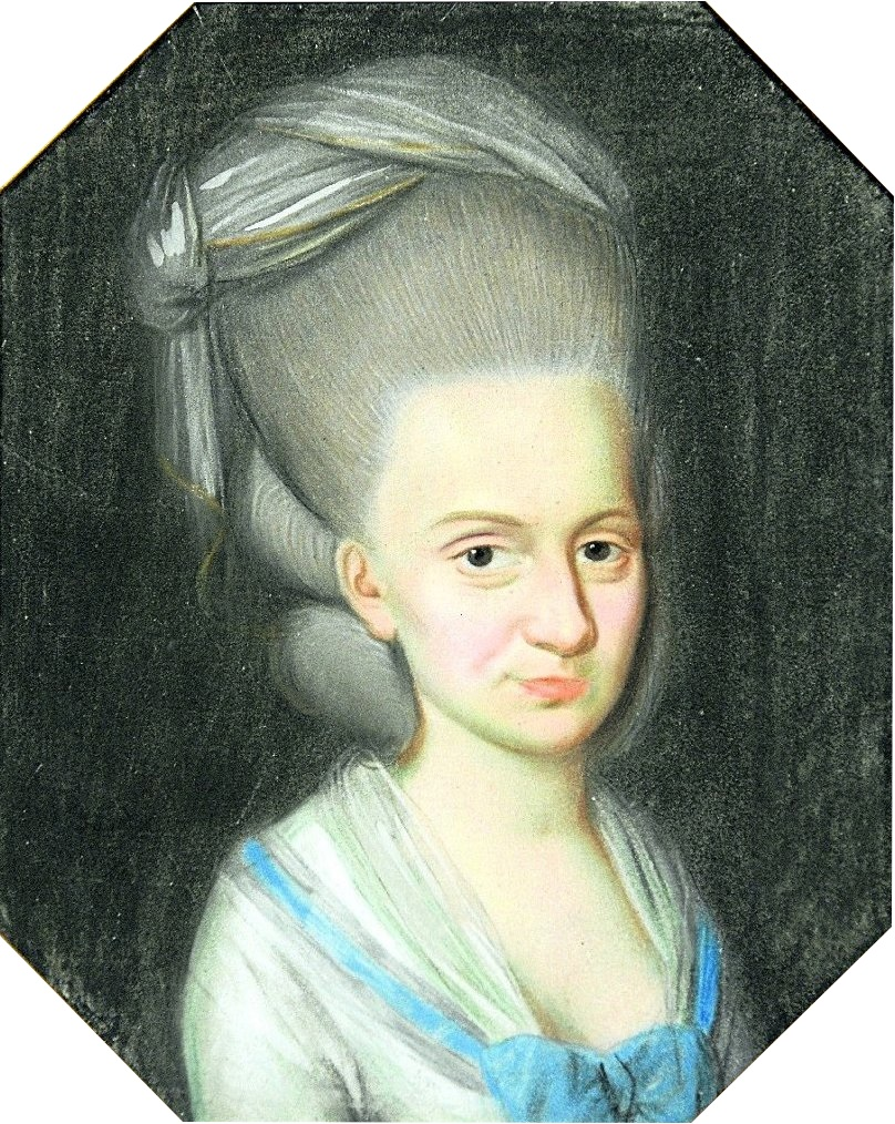 Polska szlachcianka (Muzeum Ziemi Lubuskiej)